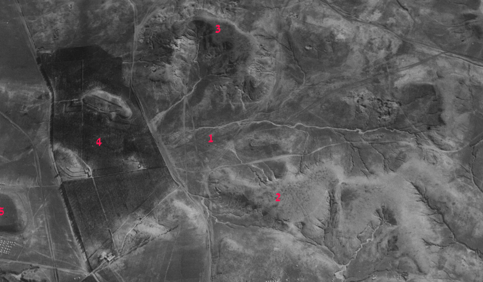 תצ"א שצולם ב-1918 על ידי הטייסת הבווארית 30. בתמונה העמק סביבו התיישבו לראשונה תושבי עיר גנים והגבעות הסובבות אותו שעל שמם נקראה עיר גנים רמת גן. 1. העמק בו עוברים היום רחובות ביאליק והרצל. 2. גבעת שאול, שבפסגתו נמצא כיום גן שאול. 3. הר אברהם, שפסגתו כיום גן אברהם. 4. פרדסים של שלושת האחים גפן, כיום שכונת הגפן. 5. גבעת נפוליאון